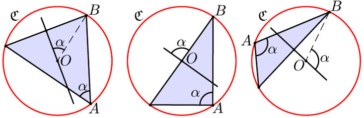 Posicions del circumcentre, segons el tipus de triangle